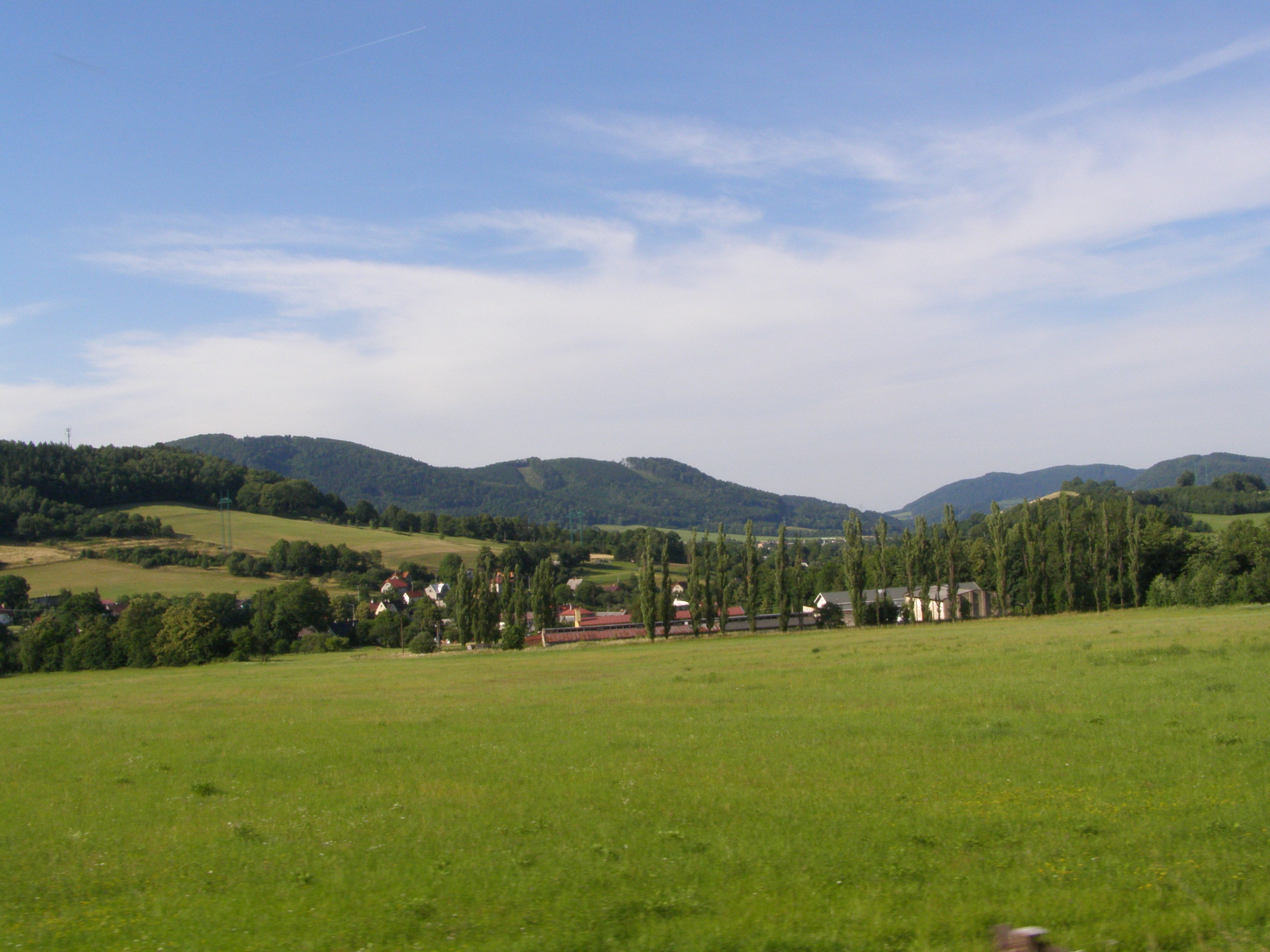 Bordovice, vlevo Šostýnké vrchy (vpředu masiv Na Peklech, za ním masiv Červený kámen), vpravo v pozadí Měrkovická pahorkatina (Kazničov a zcela vpravo Tichavská hůrka)